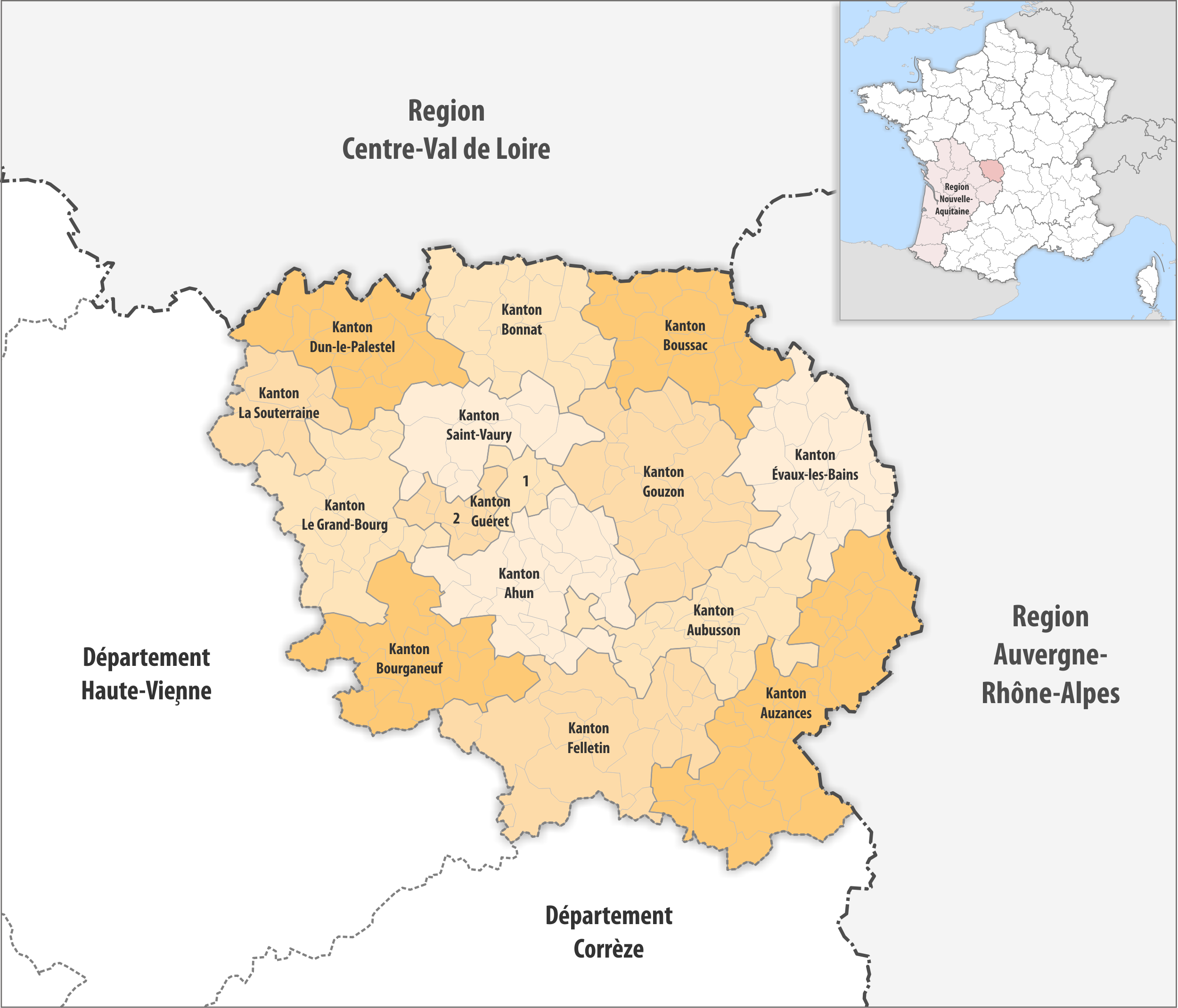 Gemeinden und Kantone im Departement Creuse